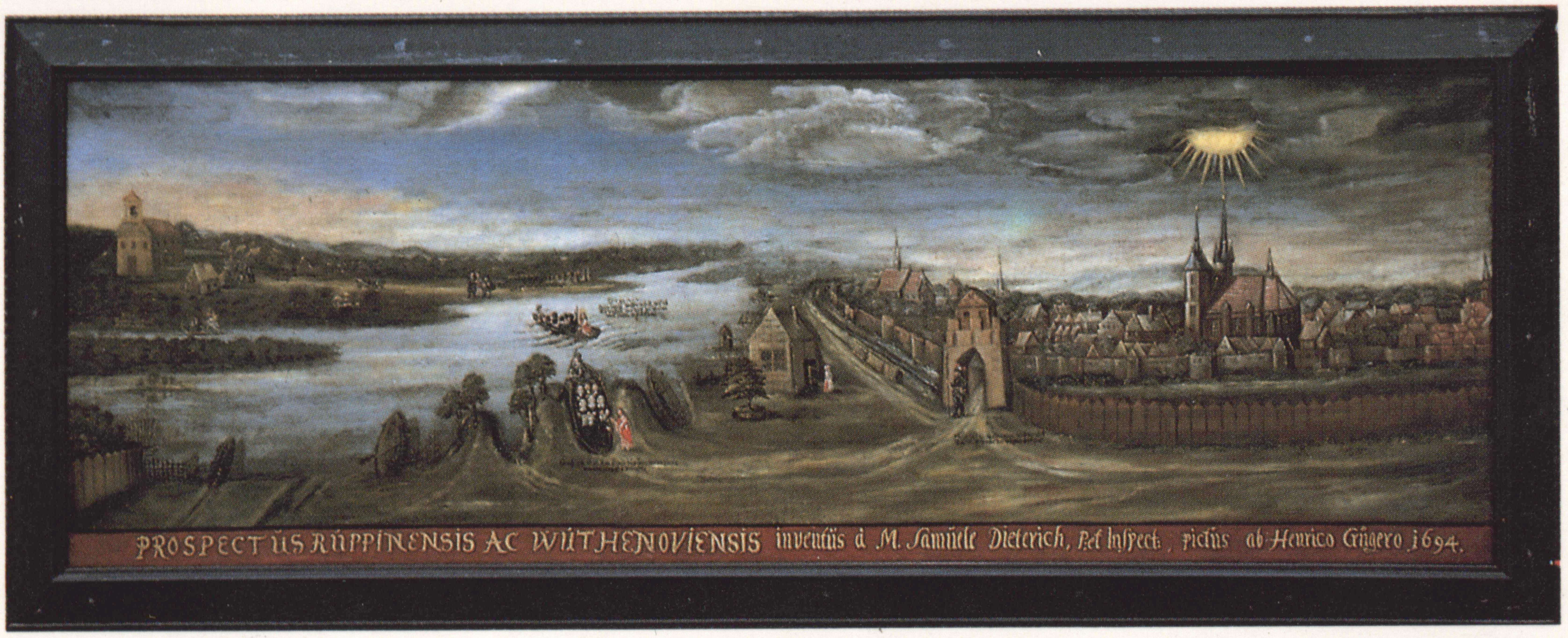 Prospectus Ruppinensis ac Wuthenoviensis, inventus a M. Samuele Dietrich, Petri Inspect.; pictus ab Henrico Crügero 1694.